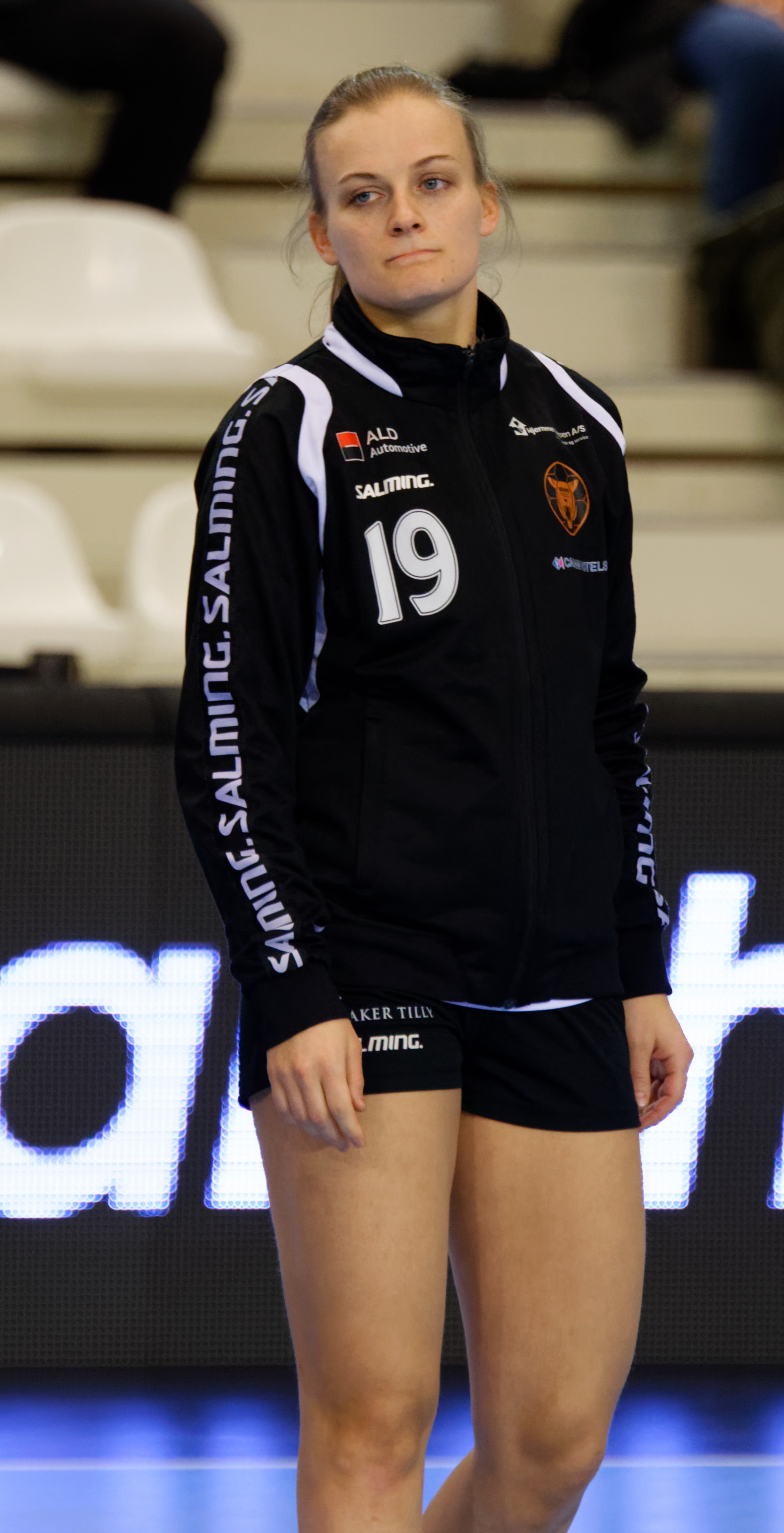 Rencontre du tour principal de la coupe EHF entre Issy Paris Hand et les danoises de Copenhague. A Issy Les Moulineaux, le 28 janvier 2018.